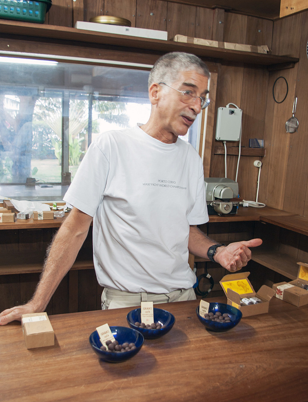 2012SaoTome-283